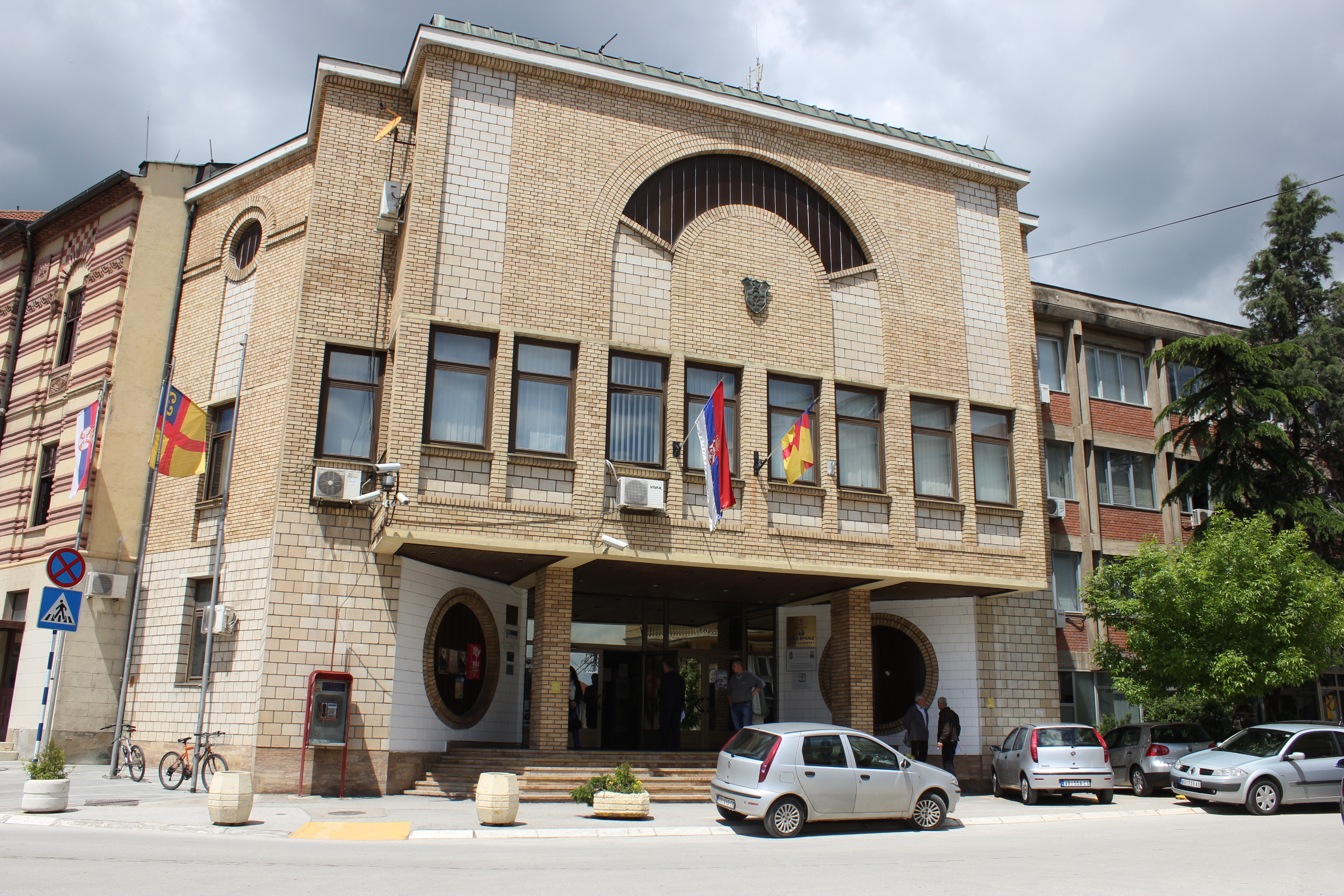 Сградата на кметството в град Враня, Сърбия.